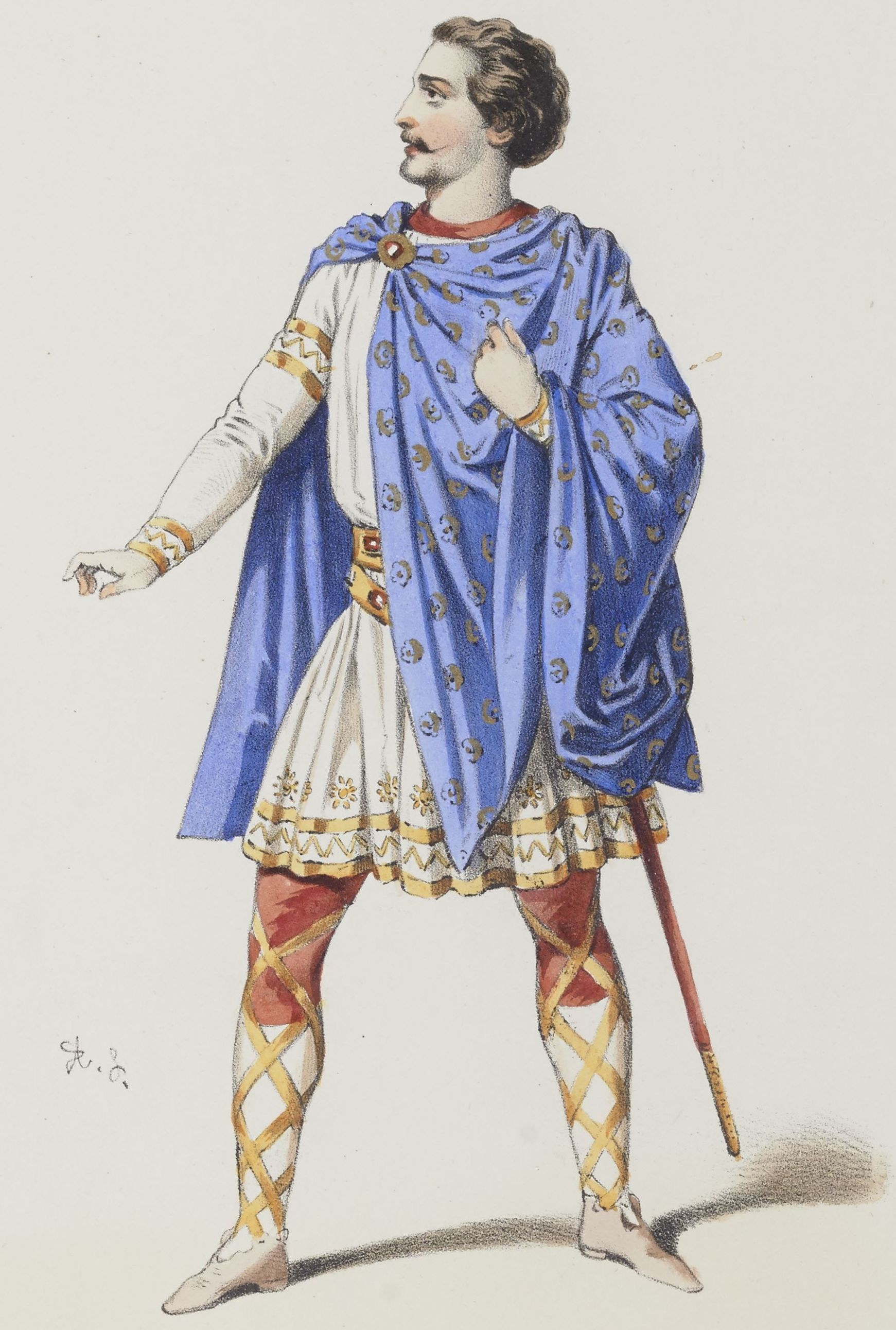 Guémart dans La nonne sanglante par Alexandre Lacauchie